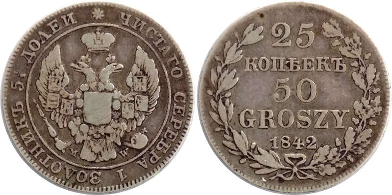 25 kopiejek50 groszy 1842